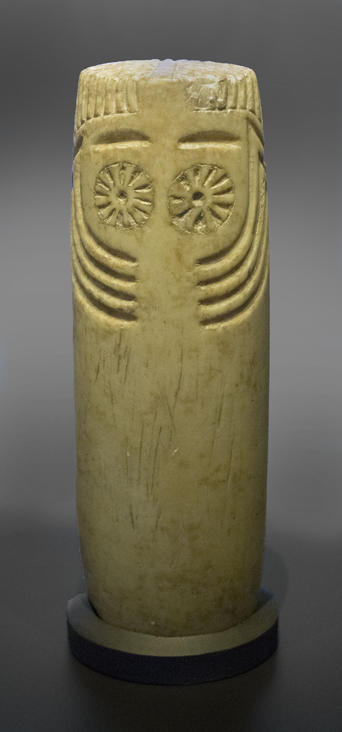 Es un nombre coloquial para esta pieza de 19 cm de altura, tallada alabastro y con lo que parecen ojos grabados. Se desconoce donde se encontró aunque por otras piezas similares es probable que fuera en el valle del Guadalquivir. Pertenece al Calcolítico, tercer milenio a.C.